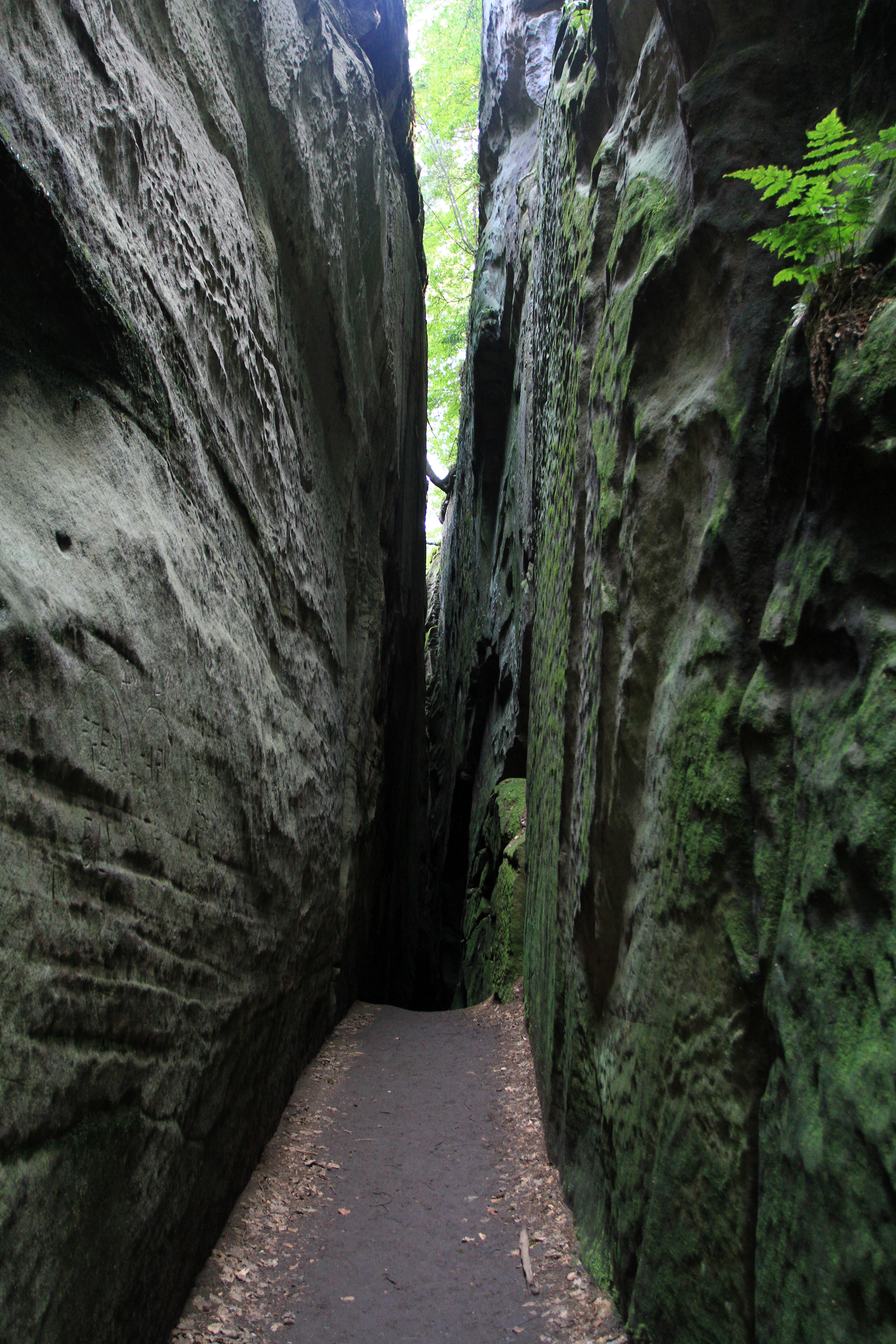 Rovinné opevněné sídliště Hrada a Klamorna, hrad Drábské světničky, SV od vsi, Dneboh